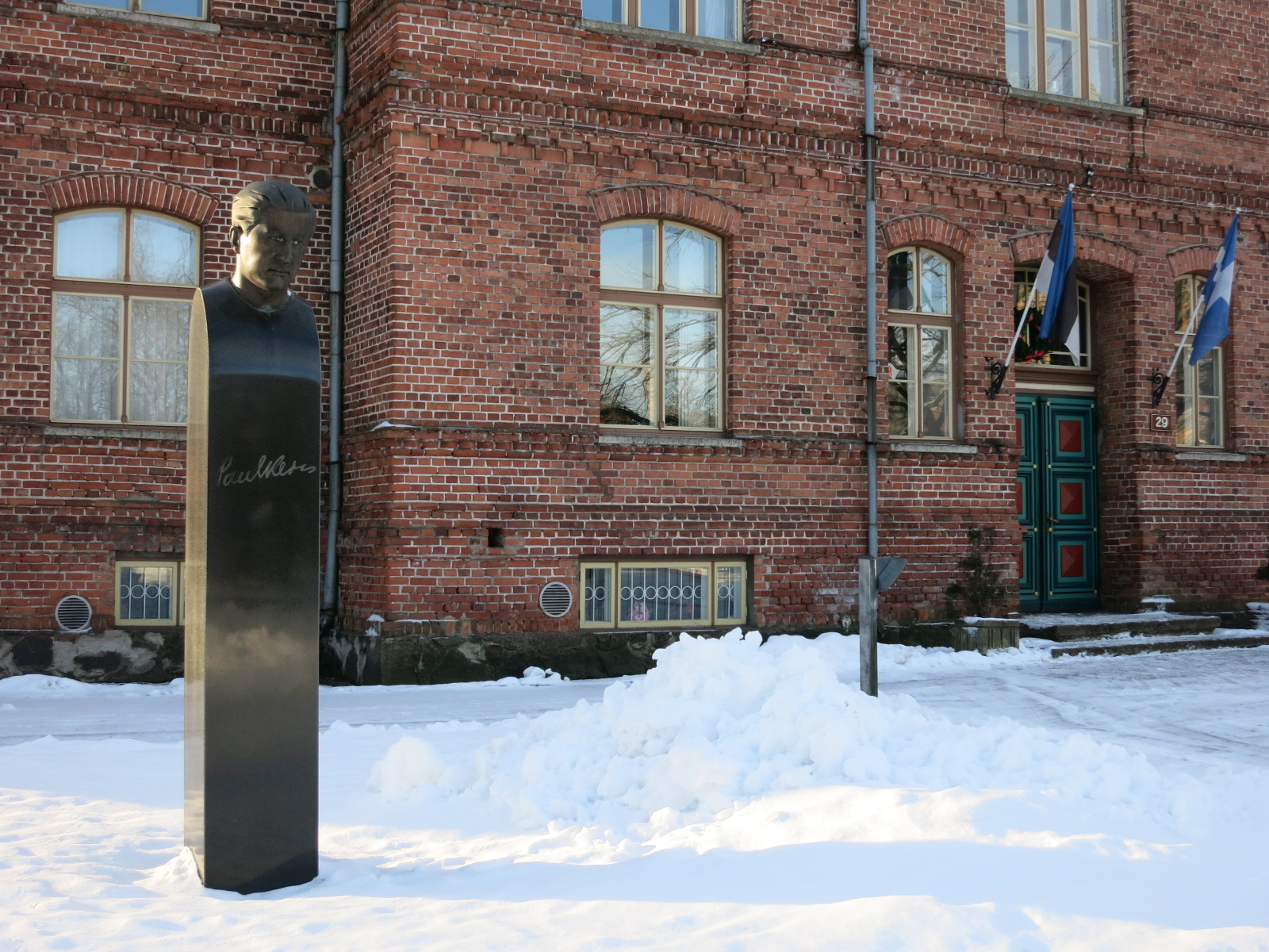 Paul Kerese mälestusmärk Pärnu Kuninga Tänava Põhikooli ees